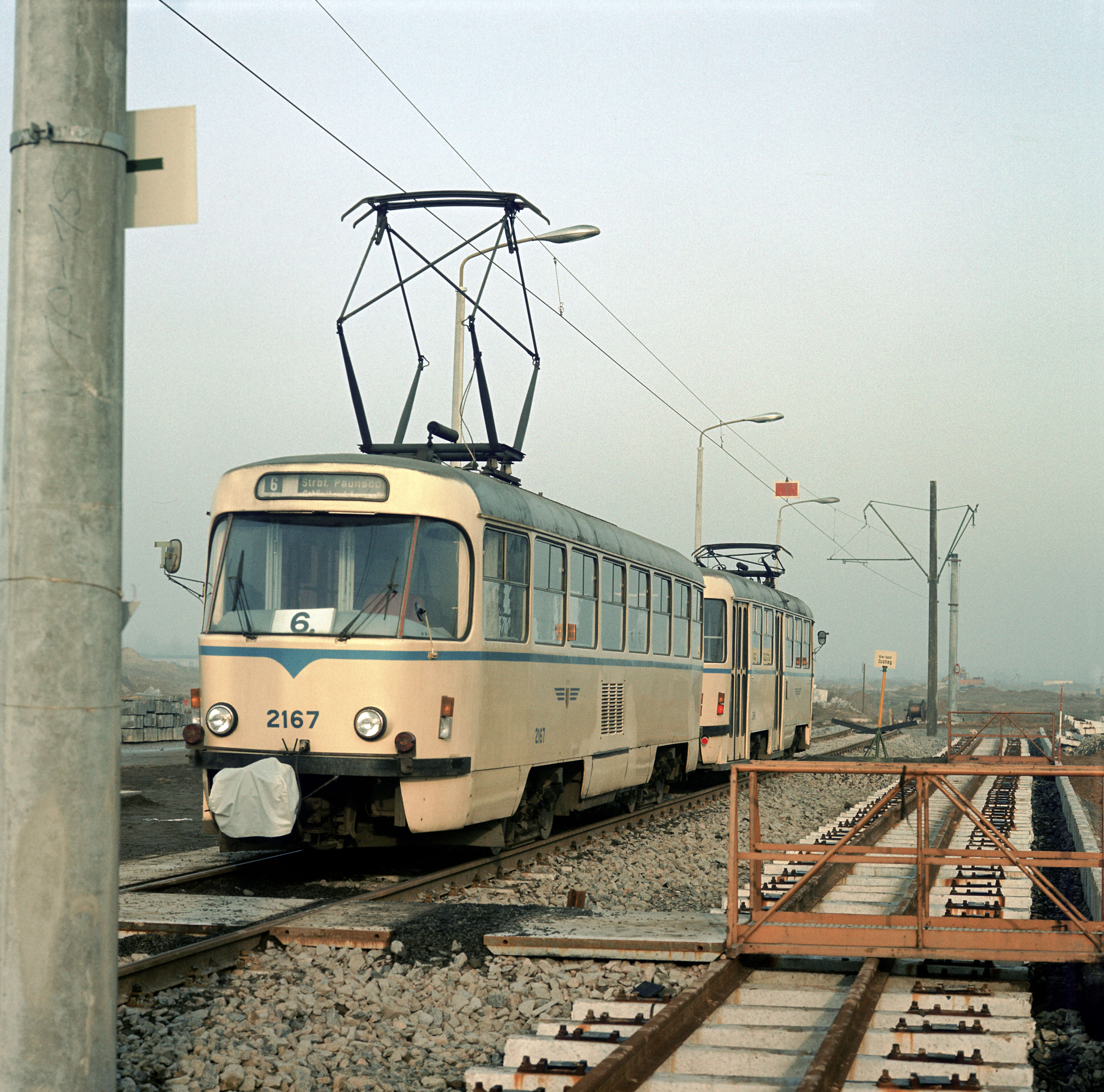 Pendelbetrieb mit zwei Heck-an-Heck gekuppelten Triebwagen zwischen Straßenbahnhof Paunsdorf und der Haltestelle »am Vorwerk« am Tag der Inbetriebnahme (Heiligabend 1987). Nur ein Streckengleis wurde dafür fertiggestellt.Der Triebwagen 2167 war mit dem Baujahr 1986 zum Aufnahmezeitpunkt erst etwa ein Jahr alt und entspricht dem Typ 33a. 1994 wurde er im Rahmen der ersten Hauptuntersuchung zum Typ 33c modernisiert.